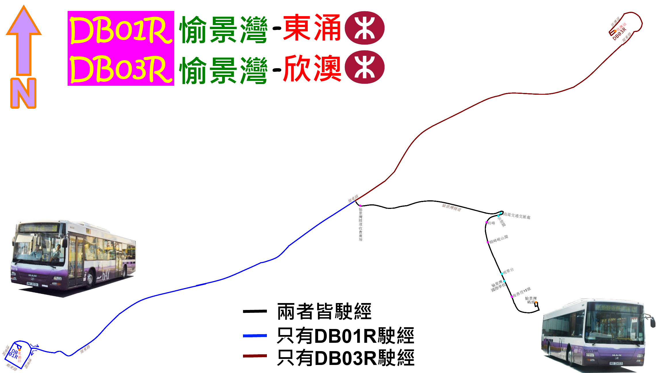 中文（香港）: 愉景灣巴士DB01R及DB03R的走線圖，當中藍線表示只有DB01R駛經；而啡線則表示只有DB03R駛經